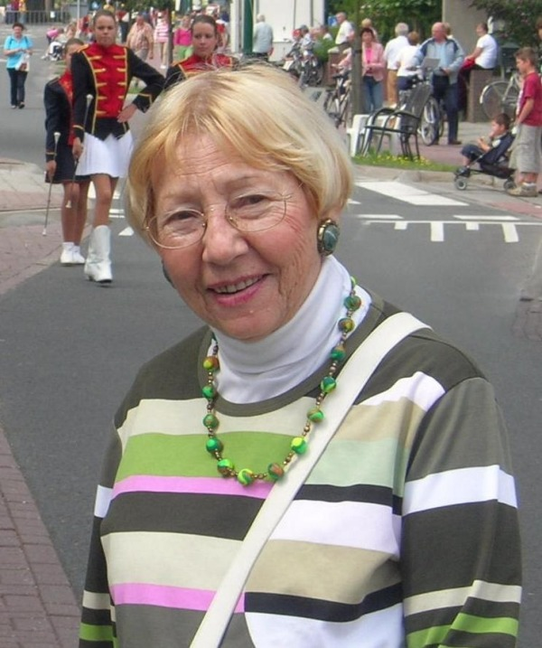 דורוטיאה ליביו